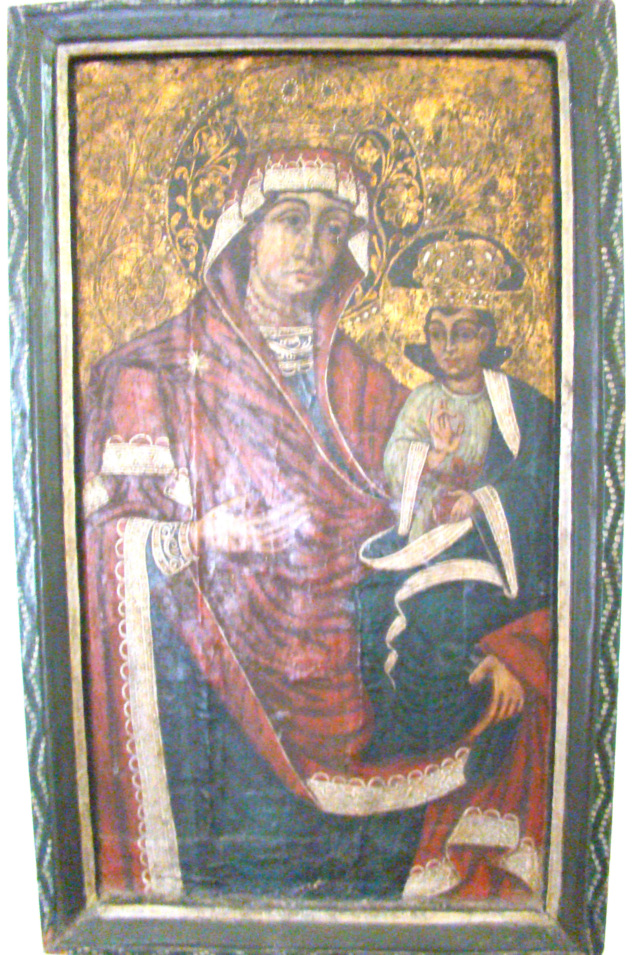 Biserica "Adormirea Maicii Domnului" a mănăstirii Vadului , sat Vad, județul Cluj